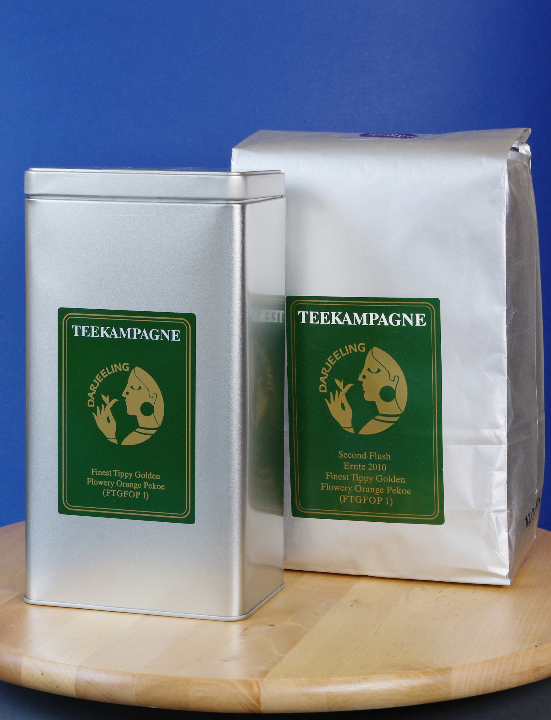 Typische Verpackung der Teekampagne